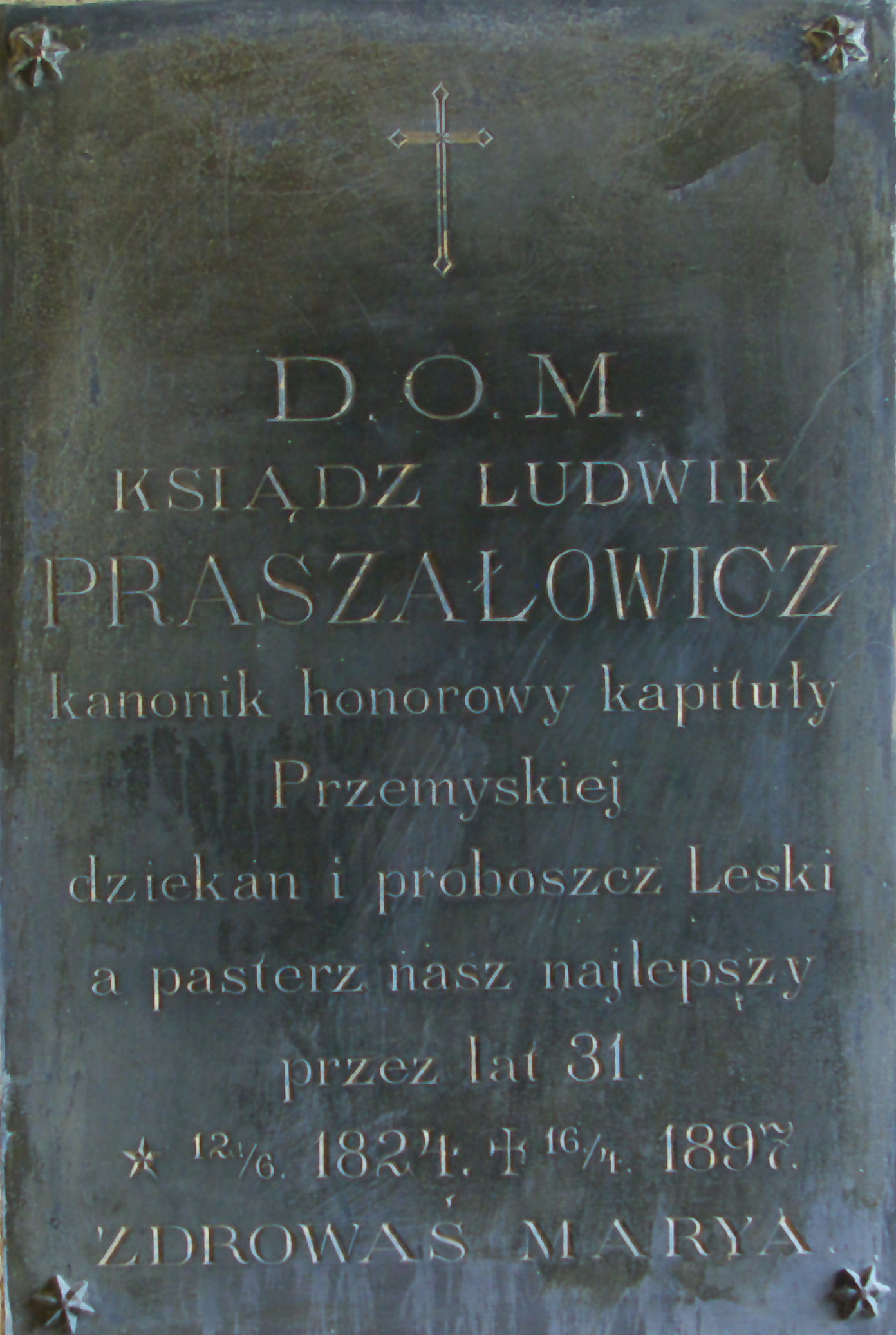 Epitafium ks. Ludwika Praszałowicza w kościele Nawiedzenia Najświętszej Maryi Panny w Lesku.